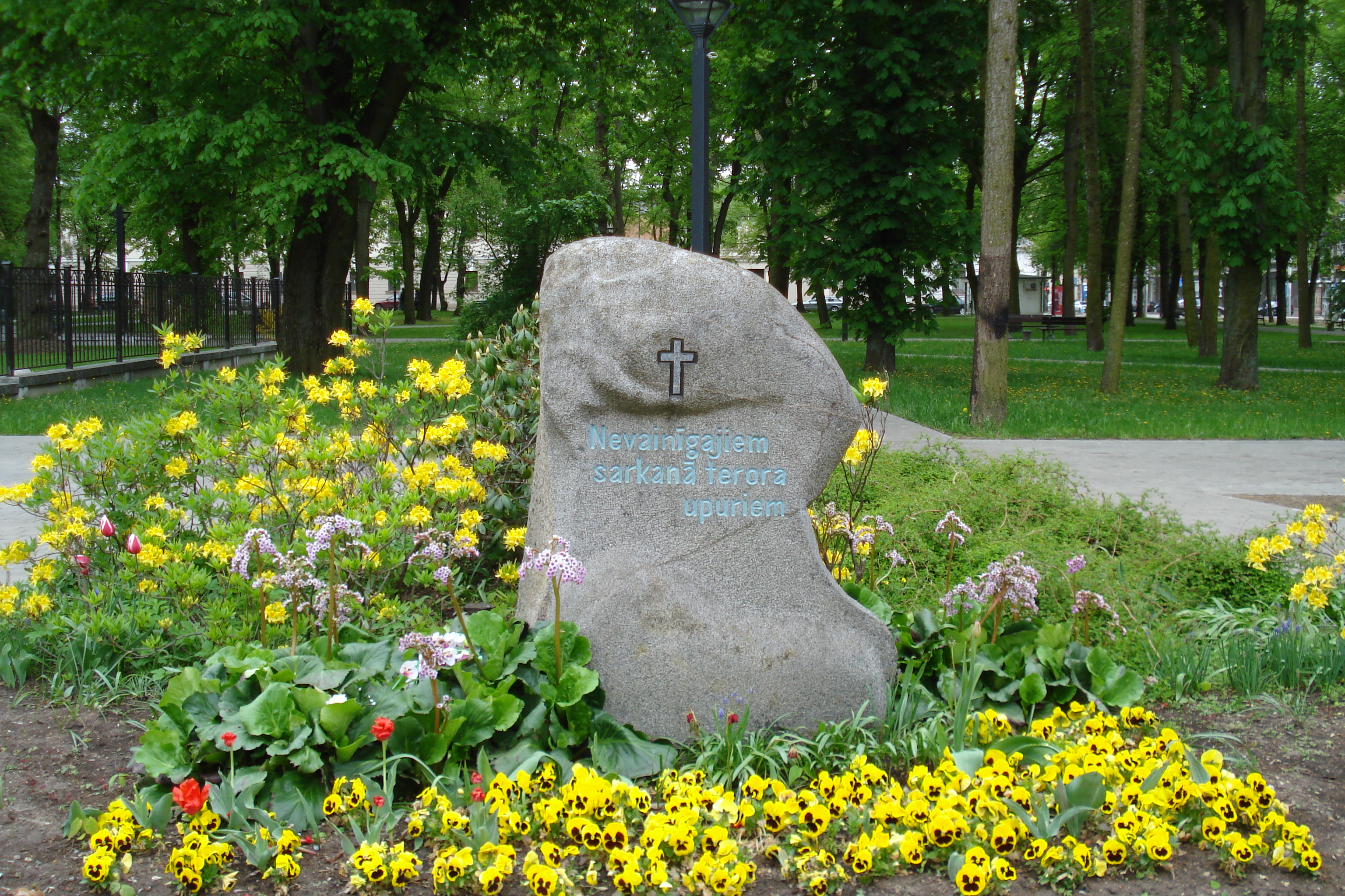 Memorial stone to victims of the red terror in Daugavpils. Памятный камень "Невинным жертвам красного террора" в парке А. Пумпура